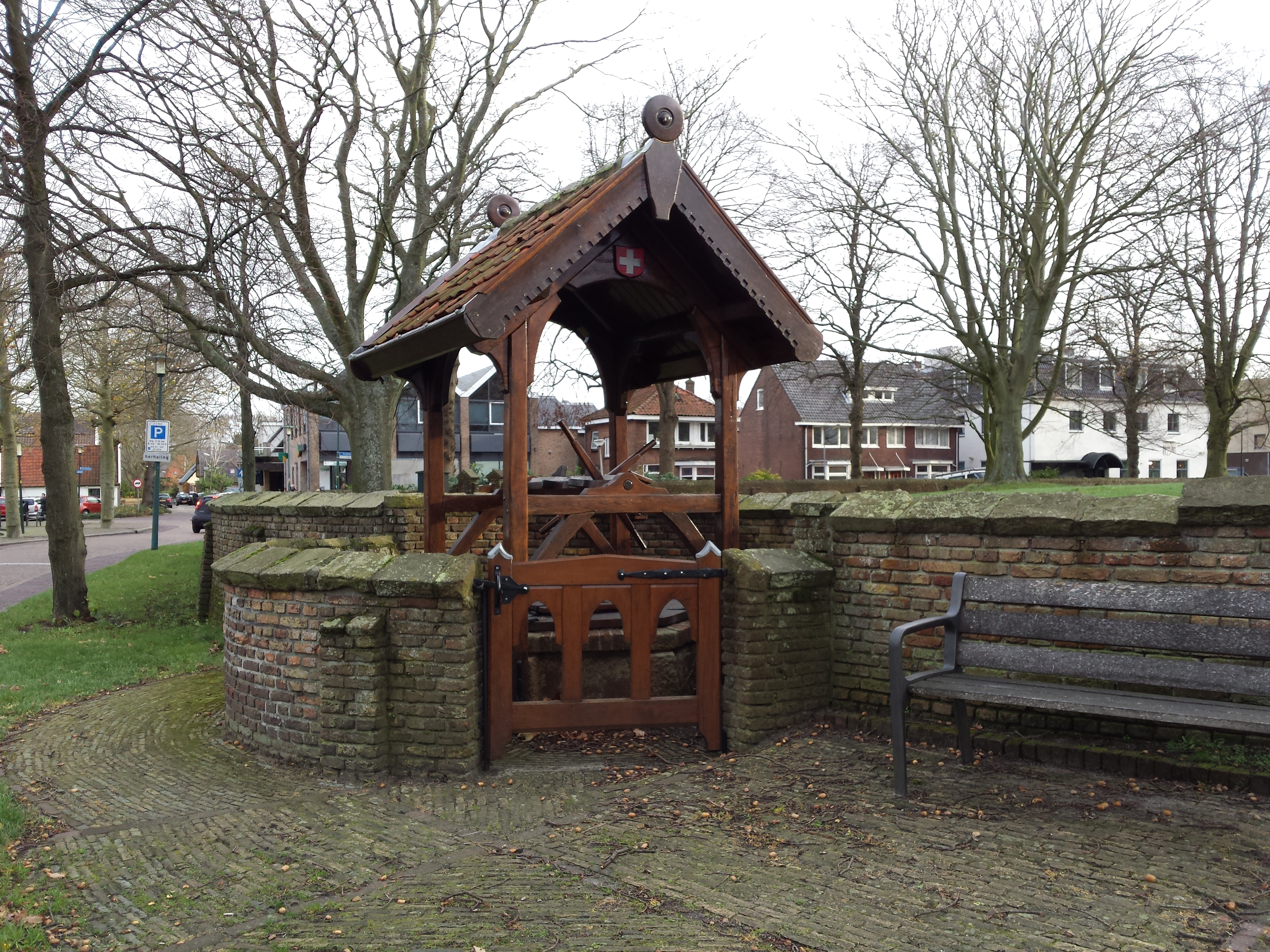 Waterput bij Witte Kerk in Heiloo